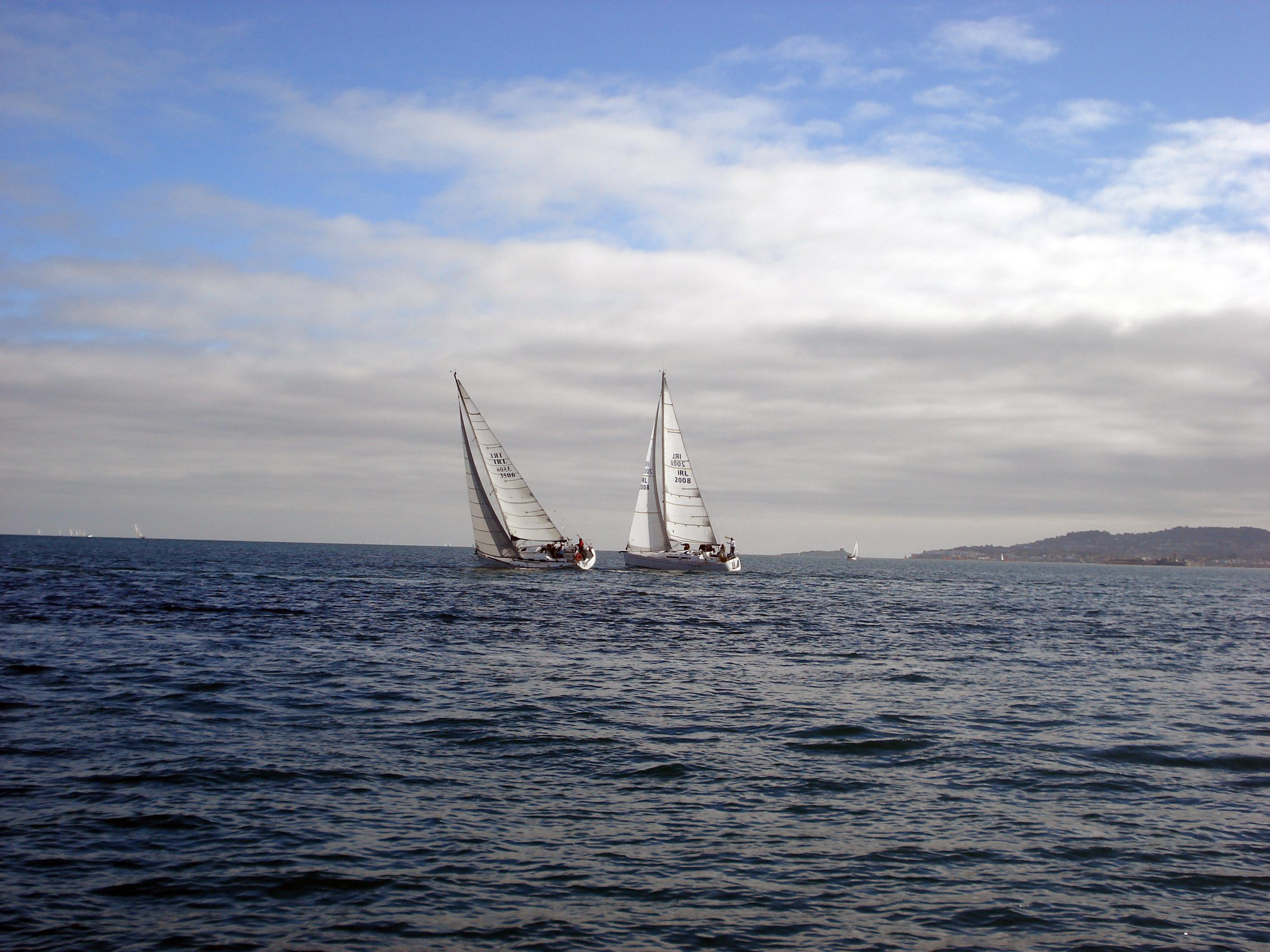 Lors d'une régate à Dún Laoghaire (Irlande)